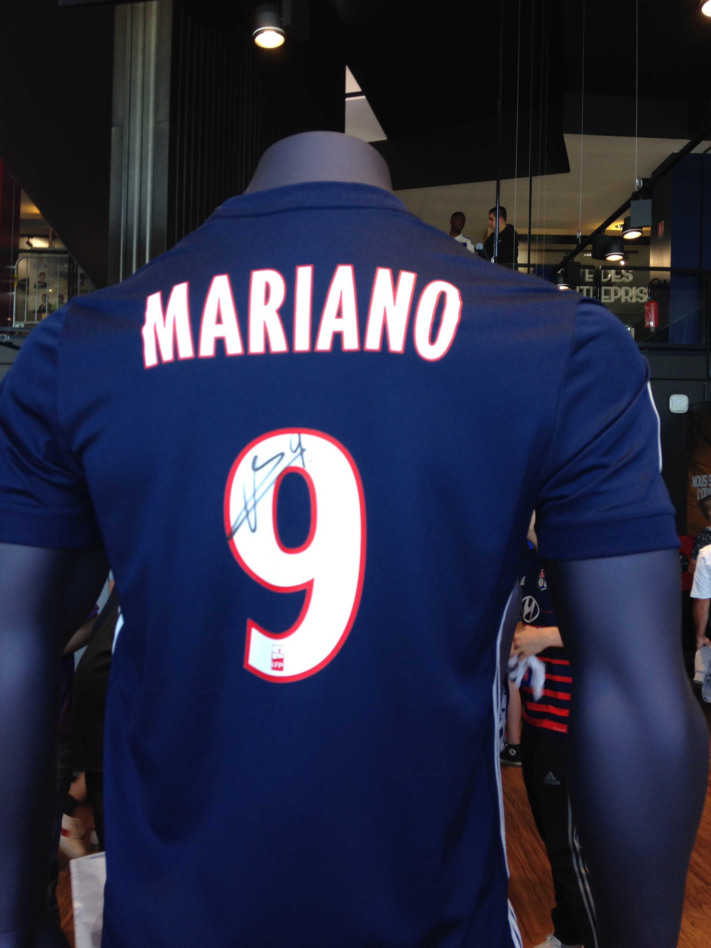 Mariano Diaz jersey